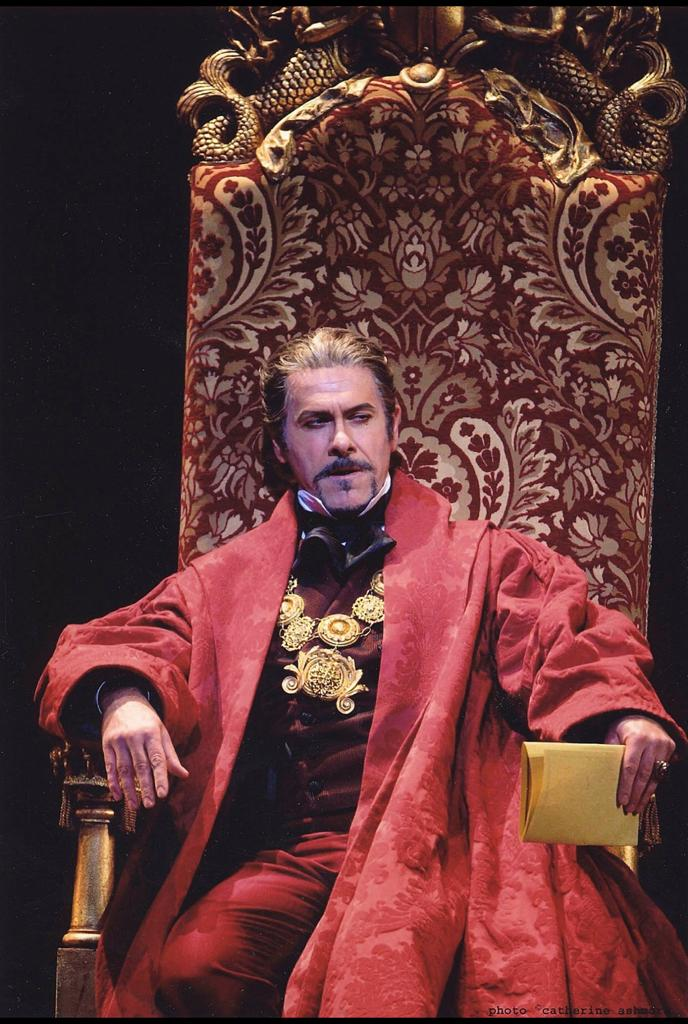 Lucio Gallo - Simon Boccanegra